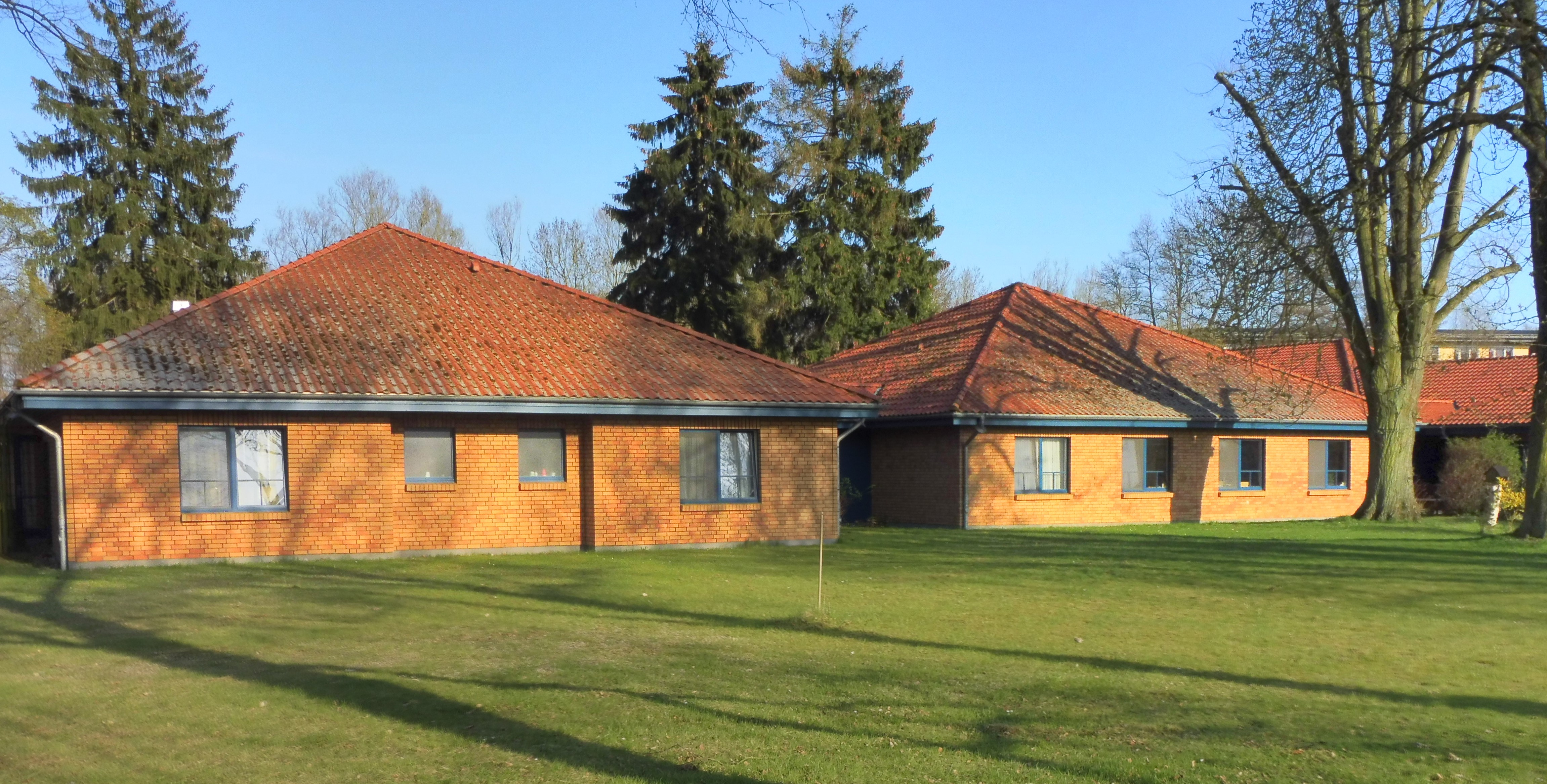 Psychosoziales Wohnheim der Diakonie in Quetzin